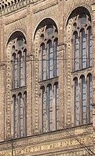 Ausschnitt aus dem Bild der Synagoge